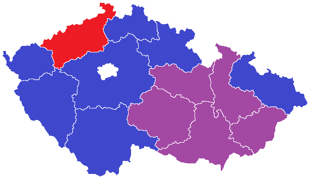 Volby do zastupitelstev krajů v roce 2000 - vítězné strany v jednotlivých krajích (modrá ODS, fialová Čtyřkoalice, červená KSČM)